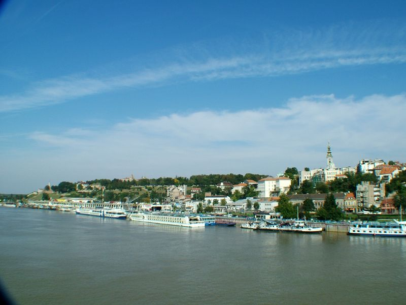 Panorama of Belgrade.Belgrade panorama 2